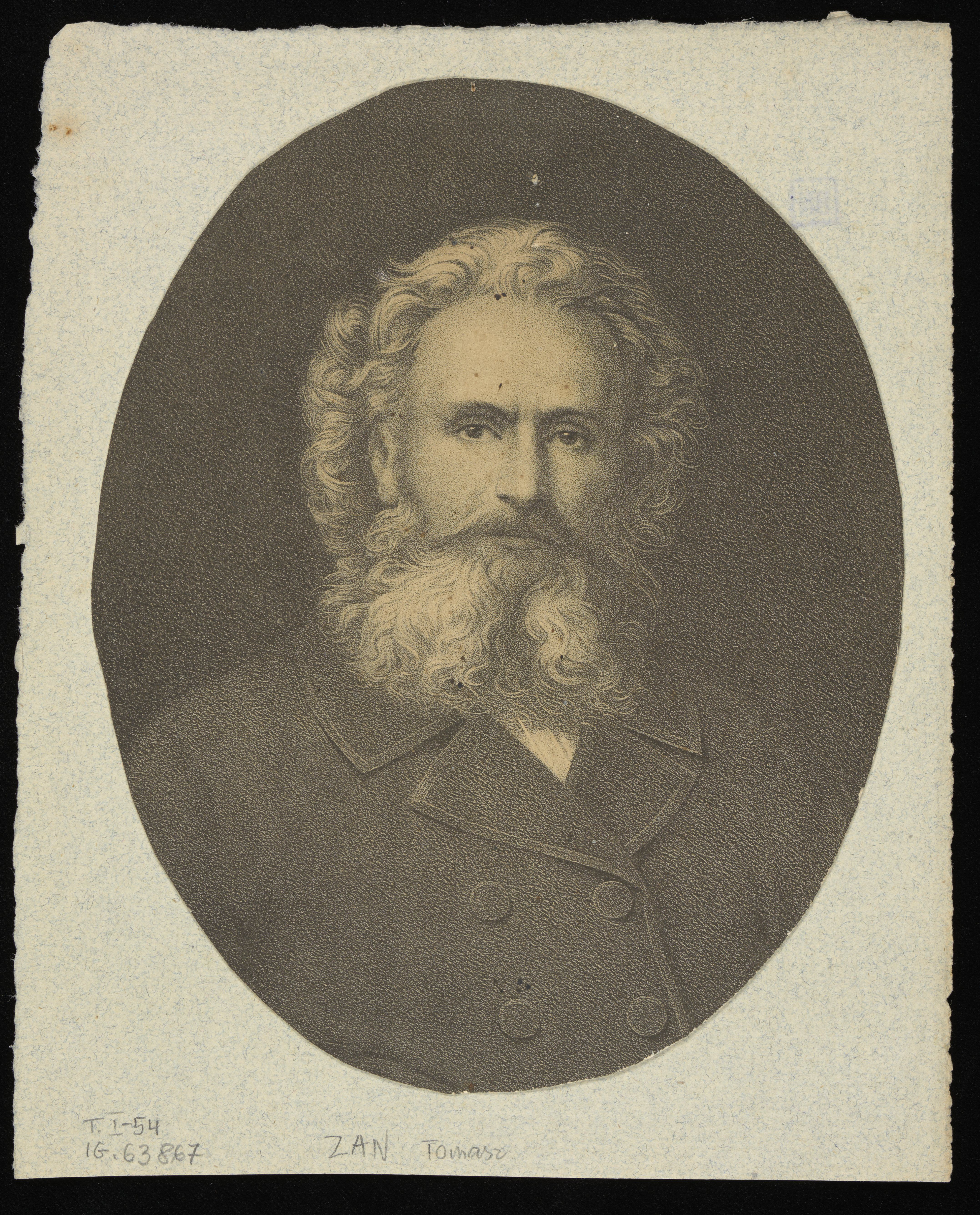 Grafika